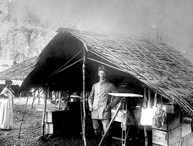 Afrika, Kamerun, Landmesser